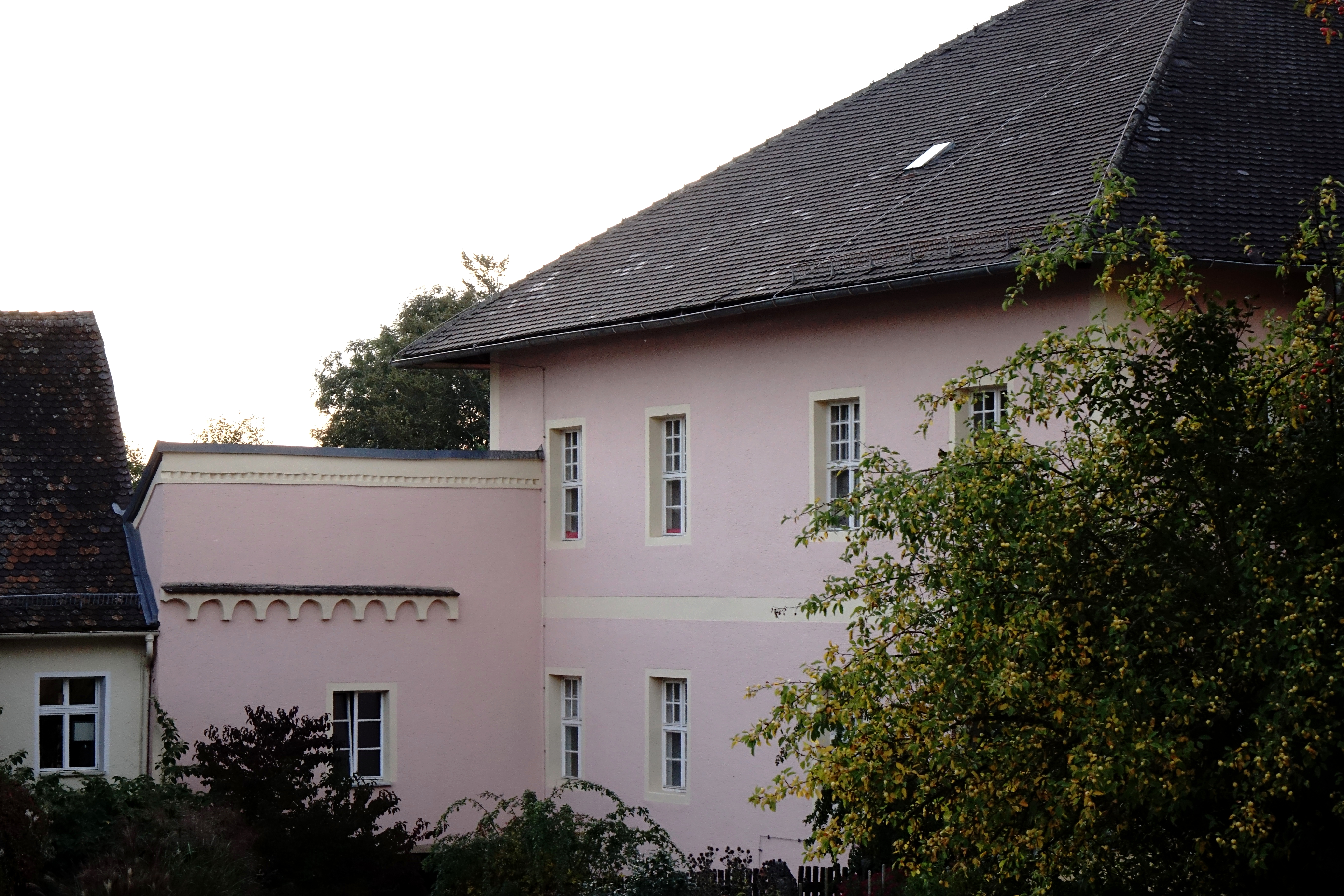 Schloss Fischbach Richtung ÖkonomiehofThis is a photograph of an architectural monument.